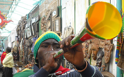 Las vuvuzelas vienen en diferentes tamaños y colores. Su precio es de aproximadamente dos o tres dólares.